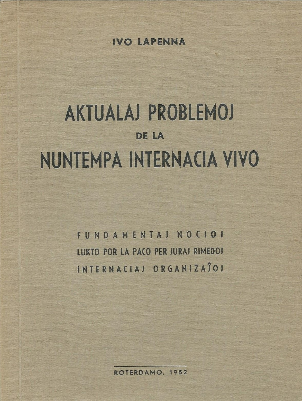 librokovrilo de "Aktualaj Problemoj de la Nuntempa Internacia Vivo", 1952